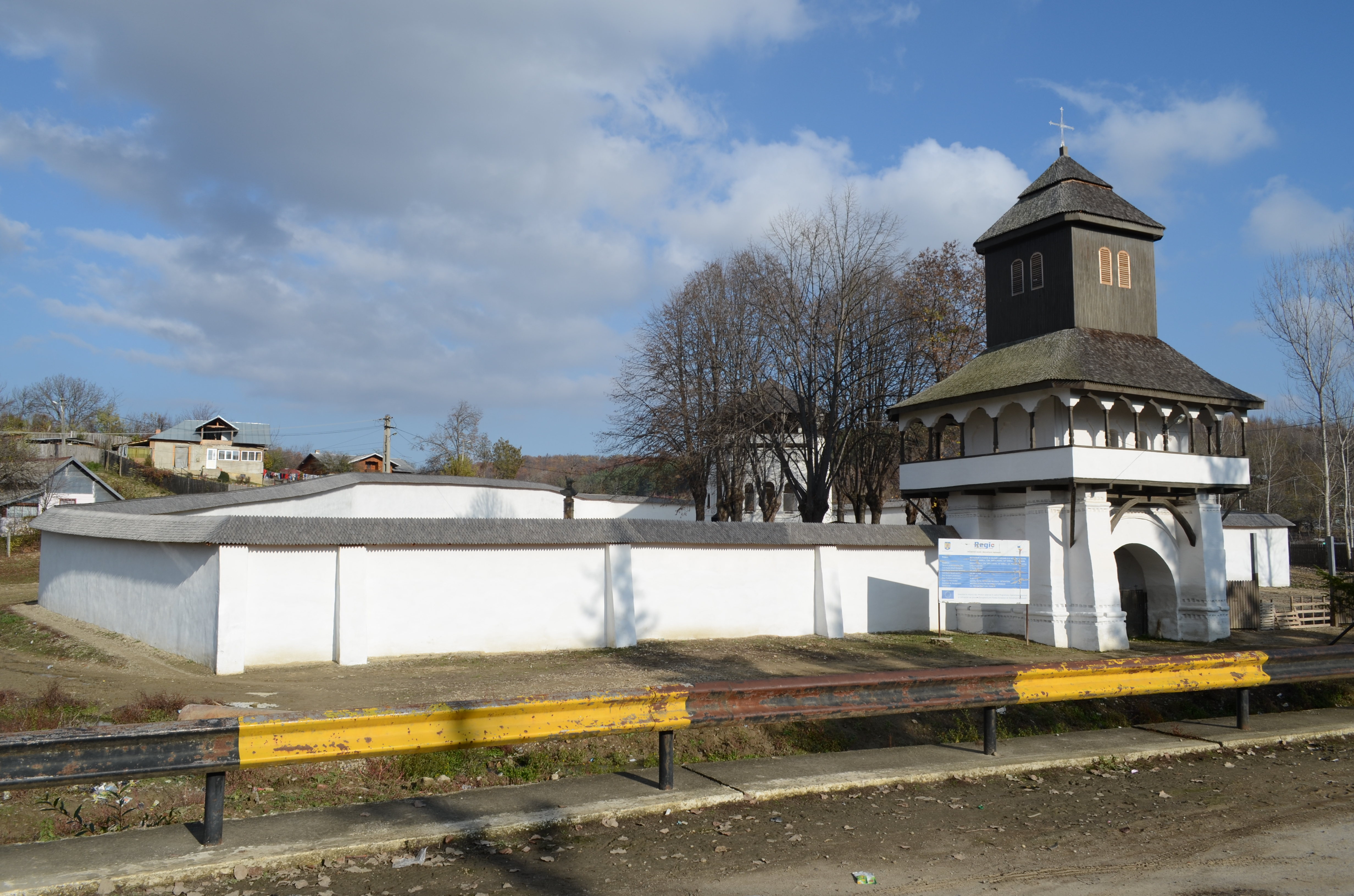 Mănăstirea Vărbila, Prahova 04